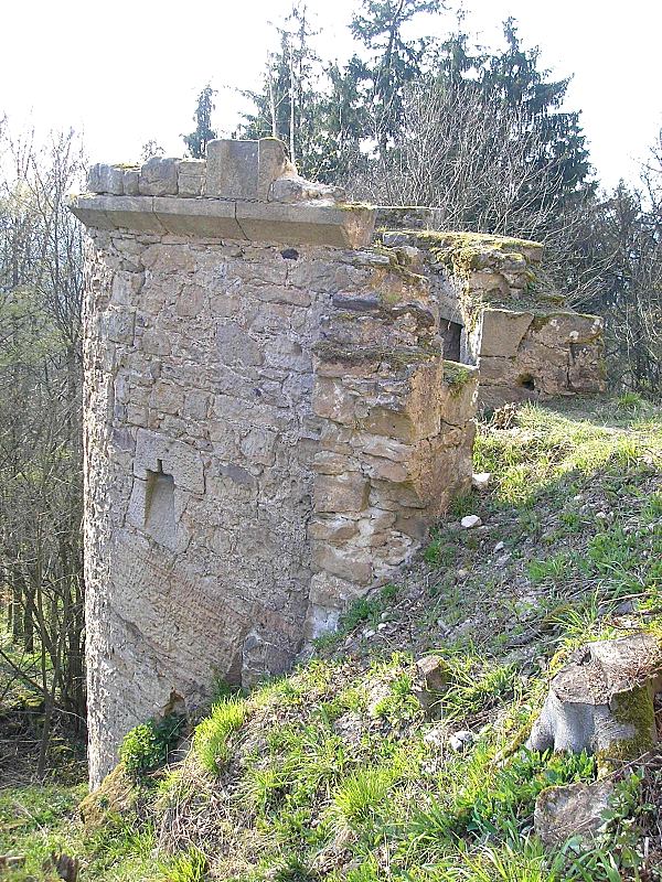 Burg Raueneck (Rauheneck) bei Ebern (Landkreis Haßberge, Unterfranken). Der südwestliche Zwingerturm. Eigene Aufnahme, Aug. 2007 / Raueneck (Rauheneck) castle near Ebern (Lower Franconia, Germany). Tower in the south west. Own photo, Aug. 2007